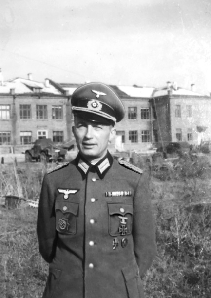 Oberst Bierling an der Ostfront, ca. 1943